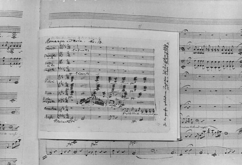 Original Partitur des "Freischütz" ADN-ZB Repro 11.10.86 Berlin: Weber-Nachlaß- Die Deutsche Staatsbibliothek besitzt die Original-Partitur des "Freischütz" von Carl Maria von Weber (1786-1826), dessen 200. Geburtstag im November mit den "Weber-Tagen der DDR" festlich begangen wird. Die erste deutsche Nationaloper erlebte am 18.6.1821 im Berliner Schauspielhaus ihre Uraufführung. Auf Drängen der Darstellerin des Ännchen, die sich gesanglich benachteiligt fühlte, mußte der Komponist eine Arie hinzuschreiben. Auf dem Foto ist zu sehen, daß diese Komposition der Eigenschrift des "Freischütz" nachträglich hinzugefügt wurde. Die Deutsche Staatsbibliothek besitzt mit der Sammlung Weberiana, zusammengetragen von Friedrich Wilhelm Jähns, und dem 1956 von der Urenkelin Mathilde von Weber erworbenen Teilnachlaß die größte Weber-Sammlung. (siehe auch 17 N und 1985-0729-14 N)